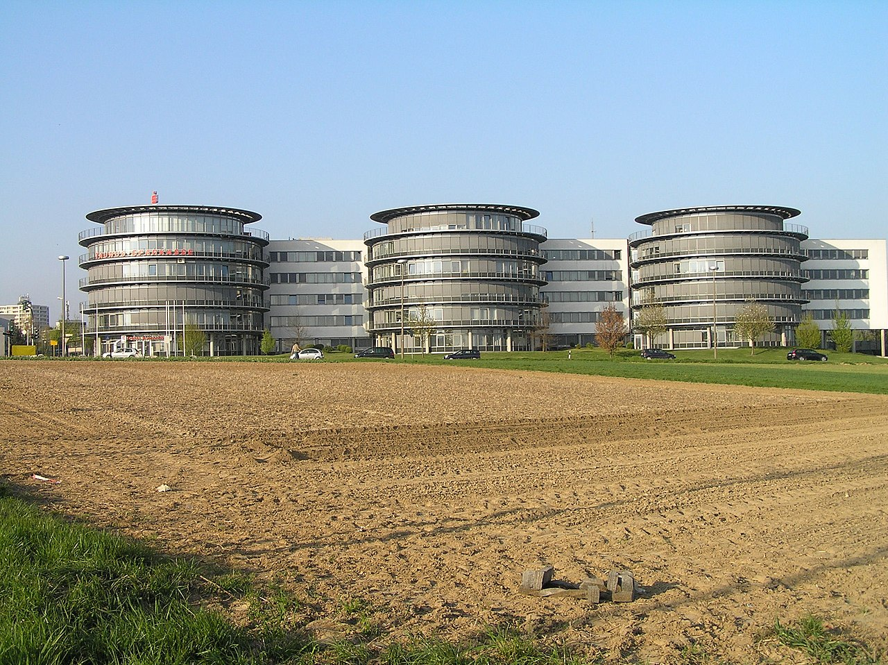 Landratsamt Hochtaunus